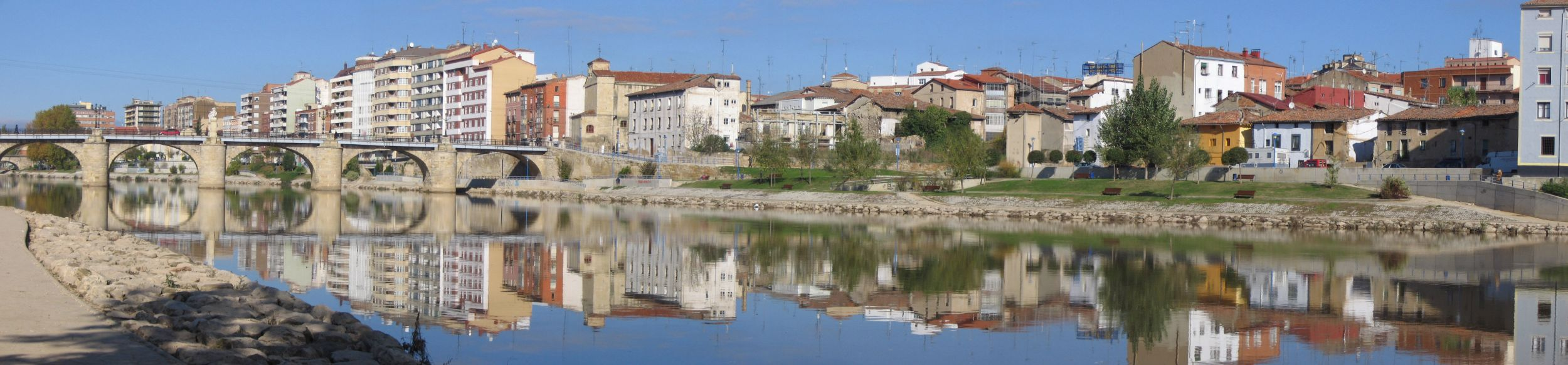 Rivera de Aquende, desde Allende. Panorámica con reflejos de "Aquende". Miranda de Ebro.